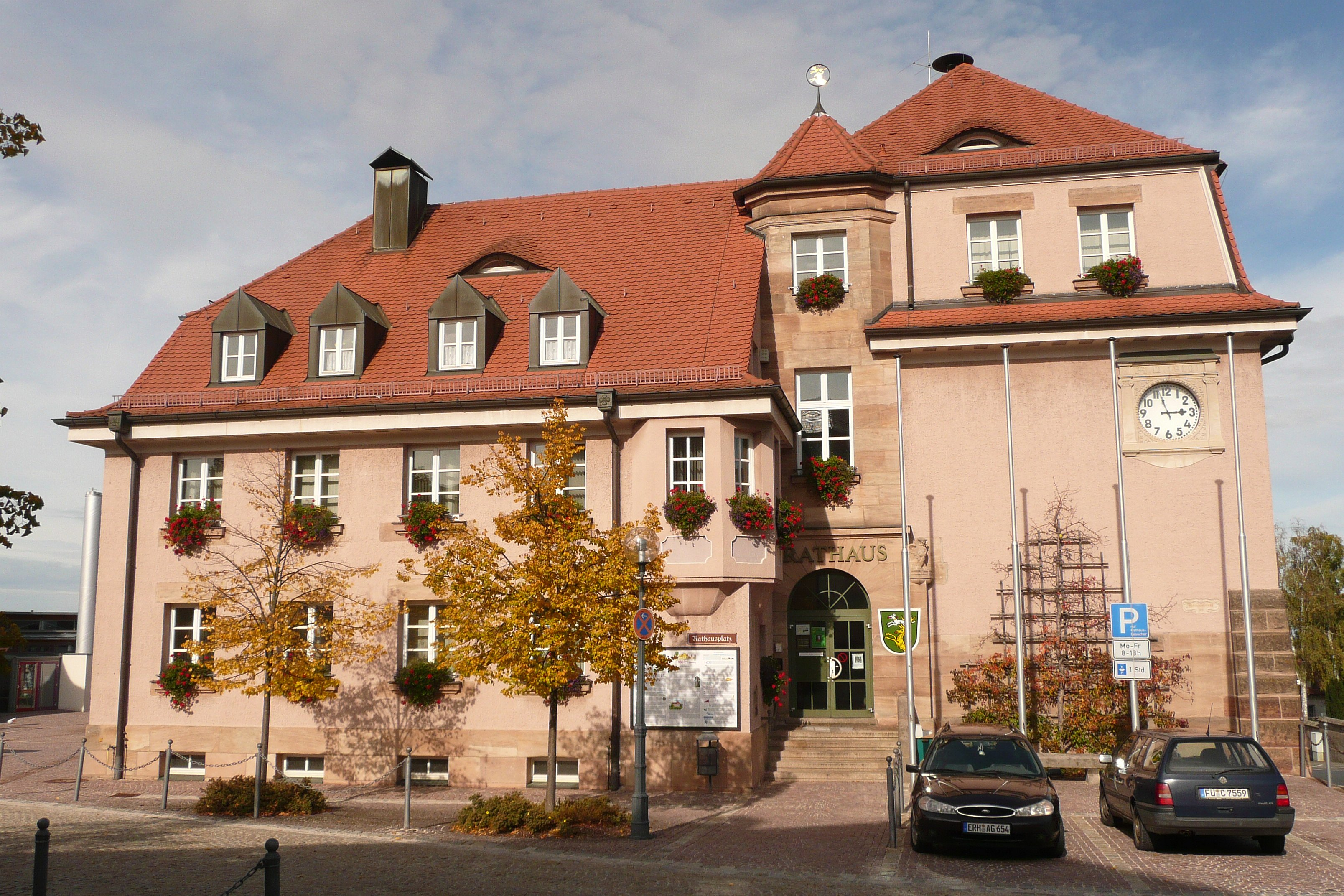 Das Rathaus von Cadolzburg (ehem. Schule, Rathausplatz 1), erbaut 1910.